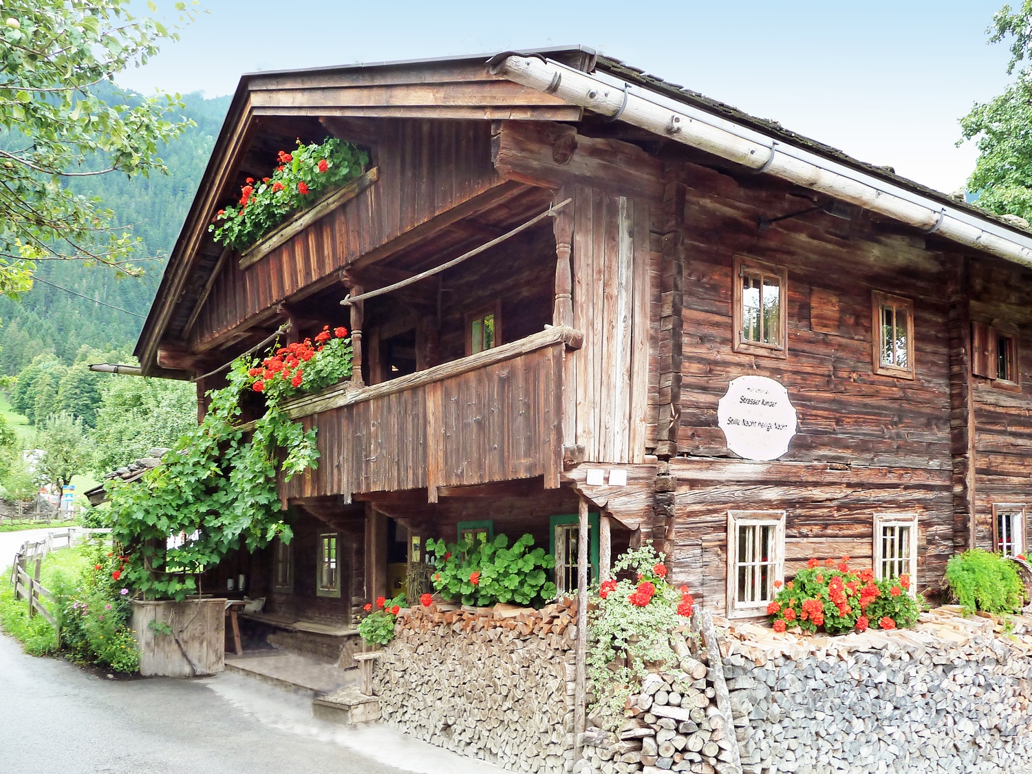 Ehemaliges Wohnhaus der Familie Strasser in Laimach (Gemeinde Hippach) im Zillertal. Ihr entstammte die Gesangsgruppe Geschwister Strasser This media shows the remarkable cultural object in the Austrian state of Tyrol listed by the Tyrolean Art Cadastre with the ID 15047. (on tirisMaps, pdf, more images on Commons, Wikidata)